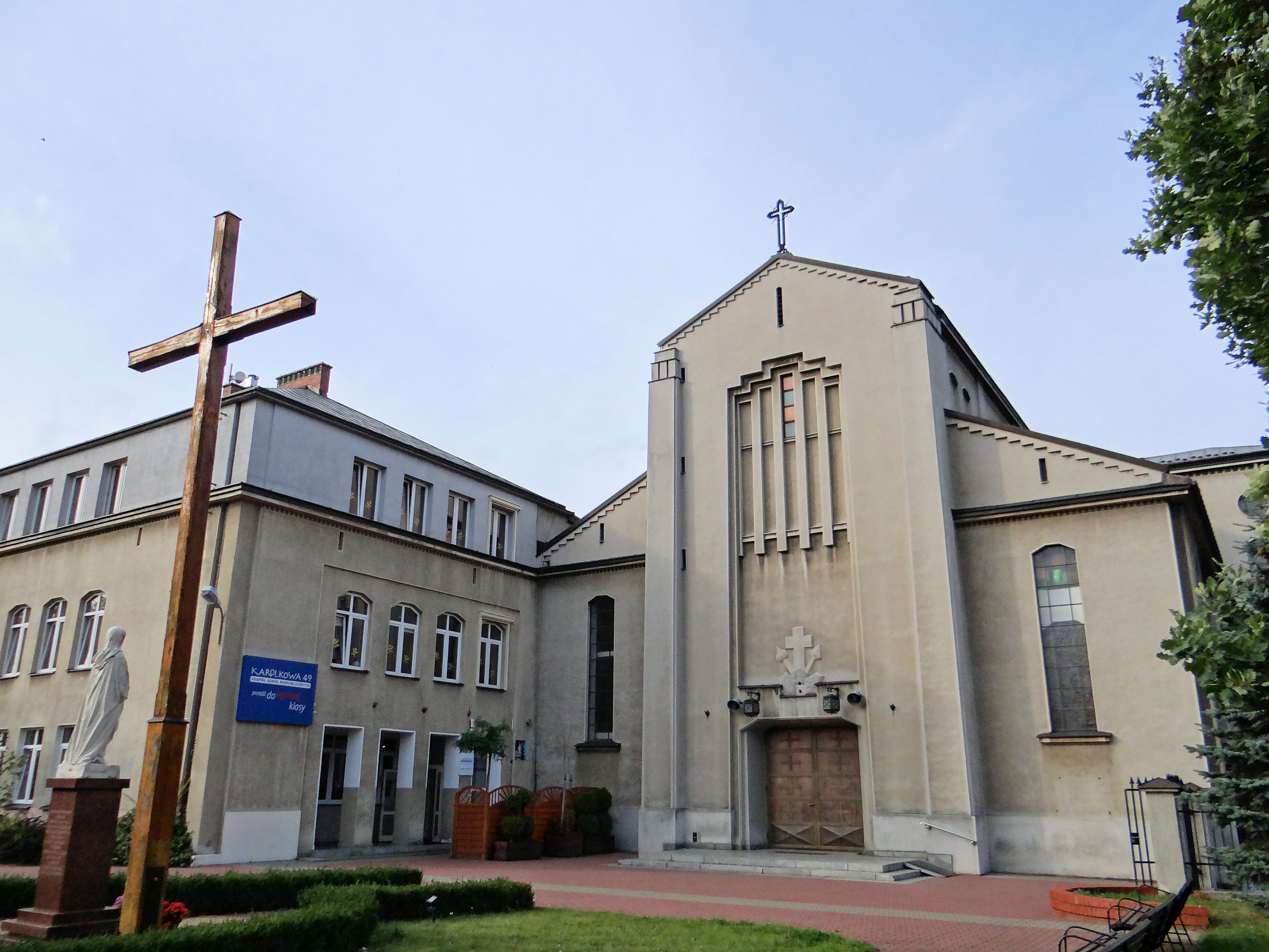 Kościół pod wezwaniem św Klemensa Hofbauera w Warszawie na Woli, przy ul. Karolkowej 49